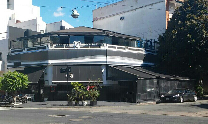 Restaurante Parrilla All Boys